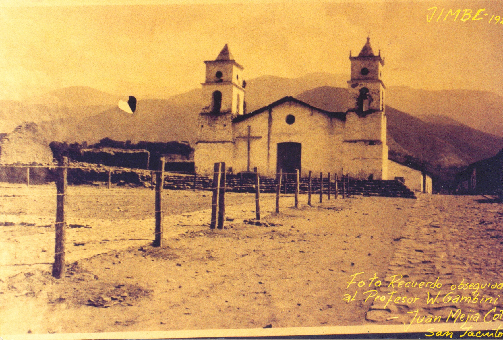 Foto de la colección Gambini, obsquiada a don Wilfredo Gambini por don Juan Mejía Cotos.